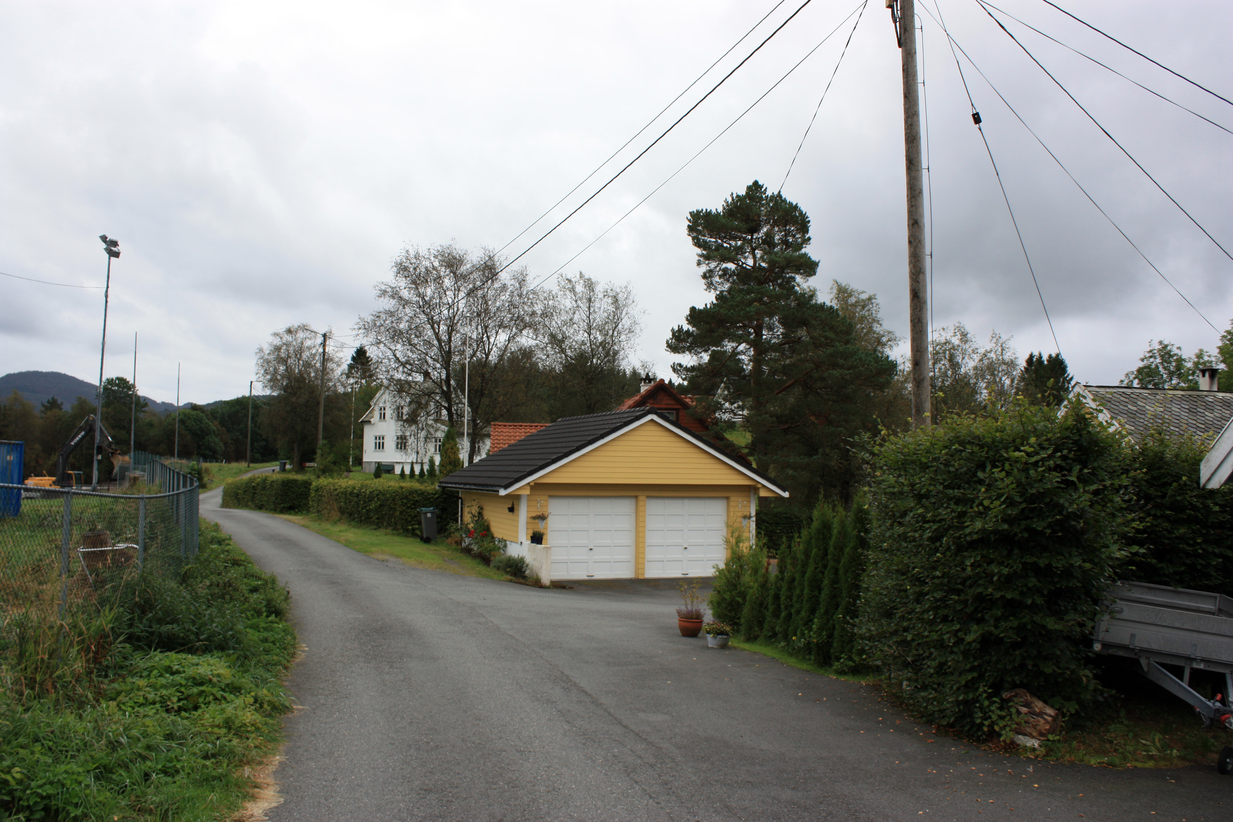 Sineset, Fana, Bergen.